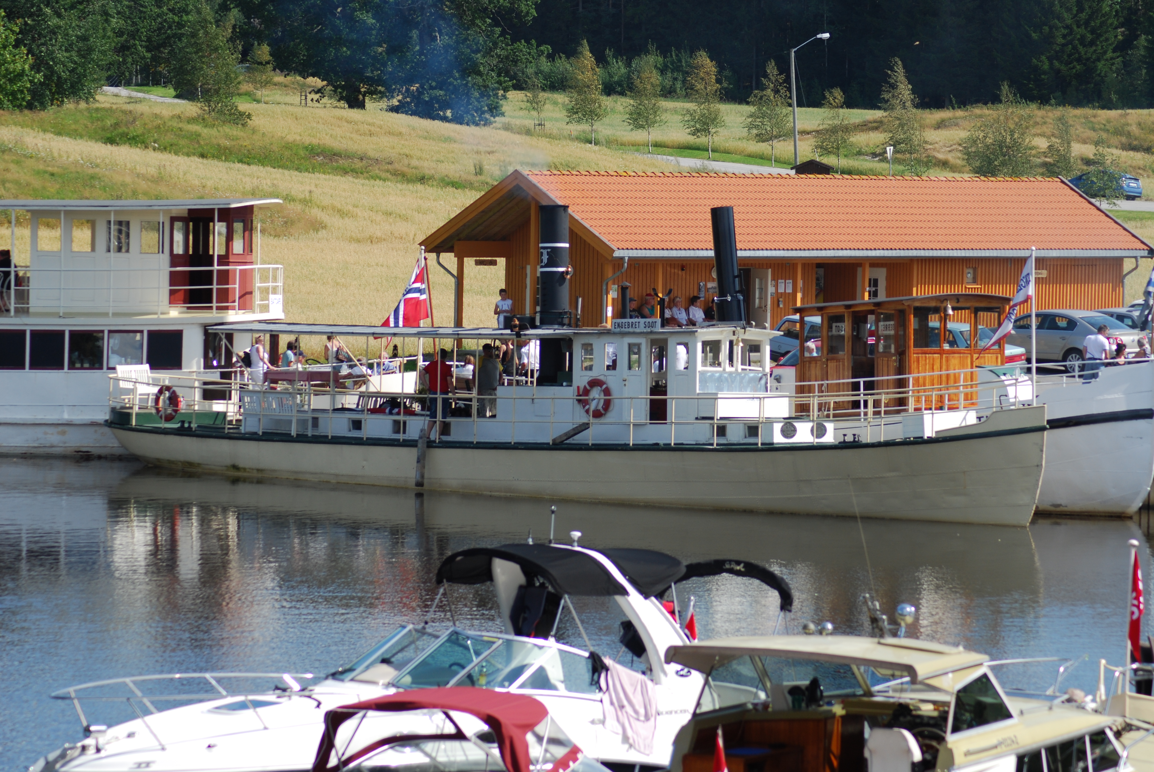 Soot liggende ved brygga i Strømfoss